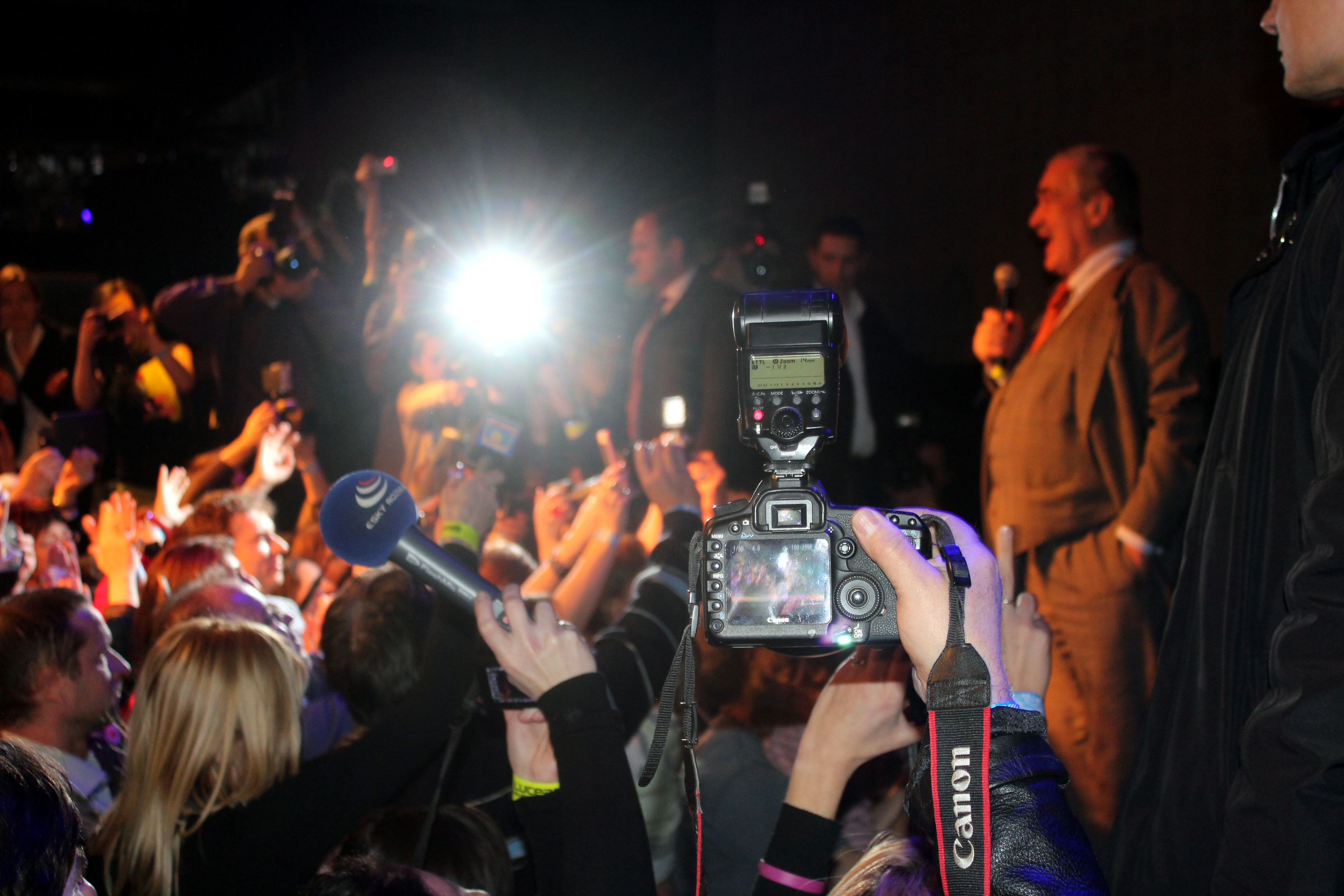 Setkání příznivců Karla Schwarzenberga v závěrečný den voleb. Palác Lucerna.